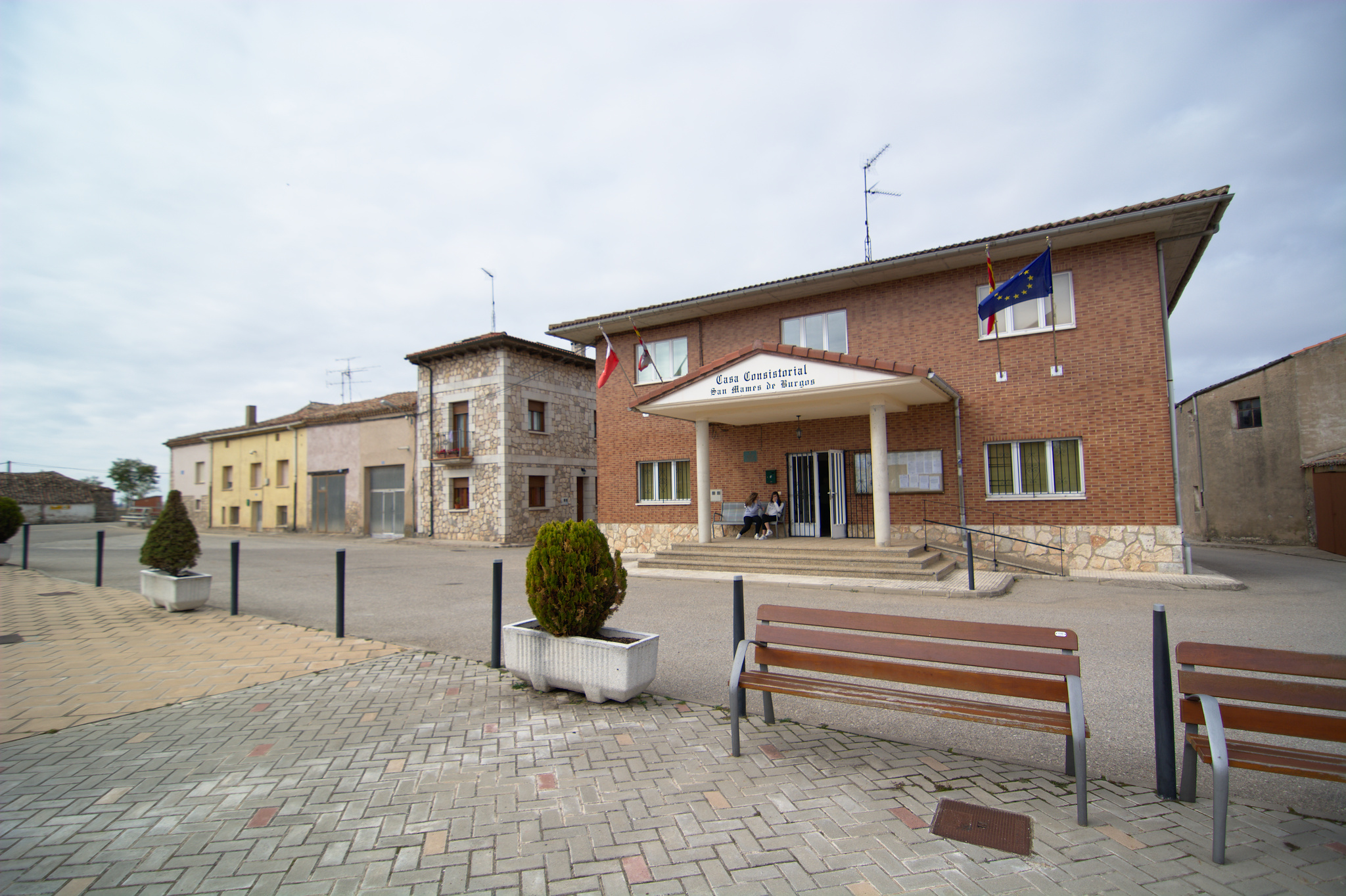 Casa consistorial de San Mamés de Burgos